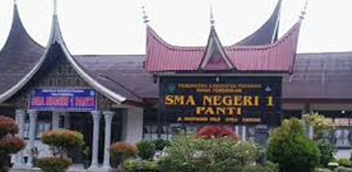 Sekolah SMA Negeri 1 Panti tampak dari depan